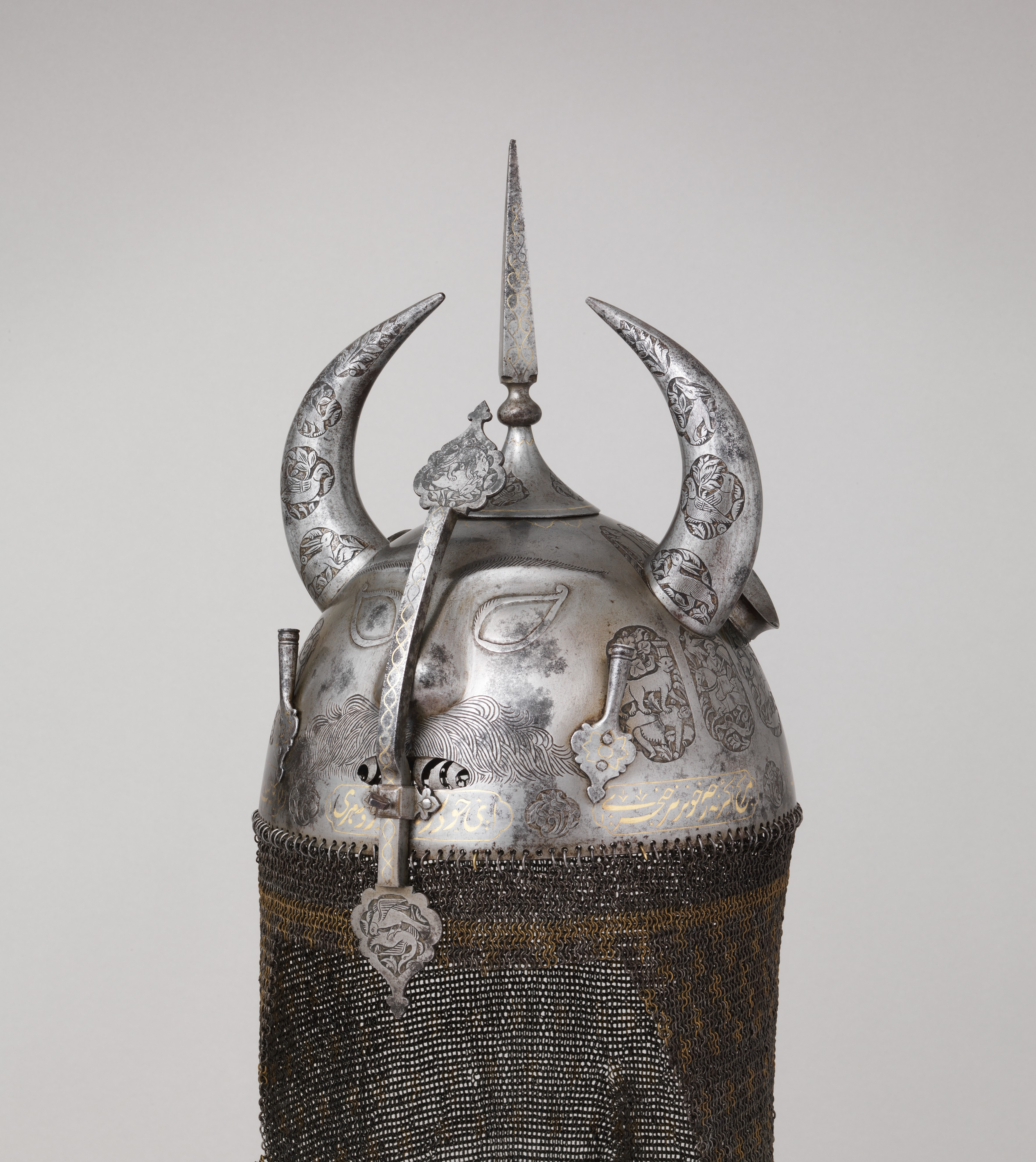 Iranian; Helmet (Khula Khud); Helmets